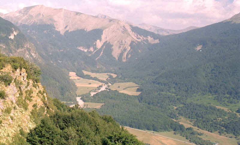 Valle de Belagua, bajo el Macizo de Larra-Belagua, en la provincia de Navarra, (España). Tomada por JMSE el 10 de julio de 2003 y cedida a Wikipedia. Categoría:España (imagen) Categoría:Fotografía (imagen)